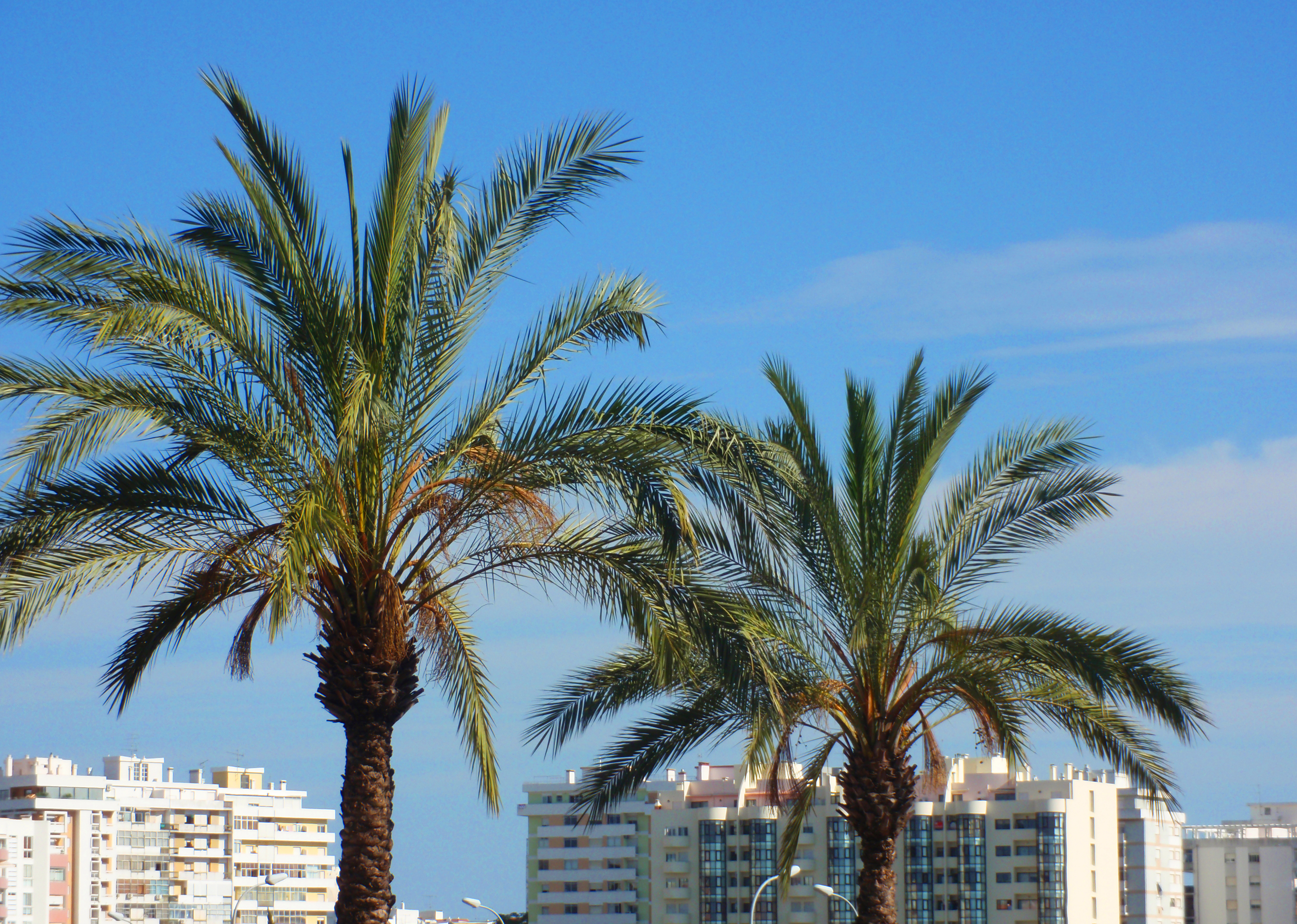 Faro (Portugal)